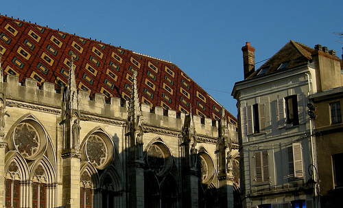 Palais synodal de Sens (Yonne)